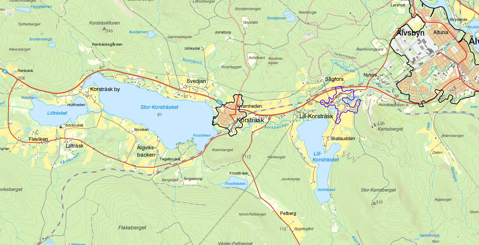 Tätorten Lidingö med gränserna från Statistiska centralbyråns tätortsavgränsning 2015 i svart. Småorten Sågfors - Lill-Korsträsk syns i lila med gränserna från småortsavgränsningen 2015. Tätorten Älvsbyn syns i högra hörnet. Bakgrundskarta från Lantmäteriet, skala 1:30 236.